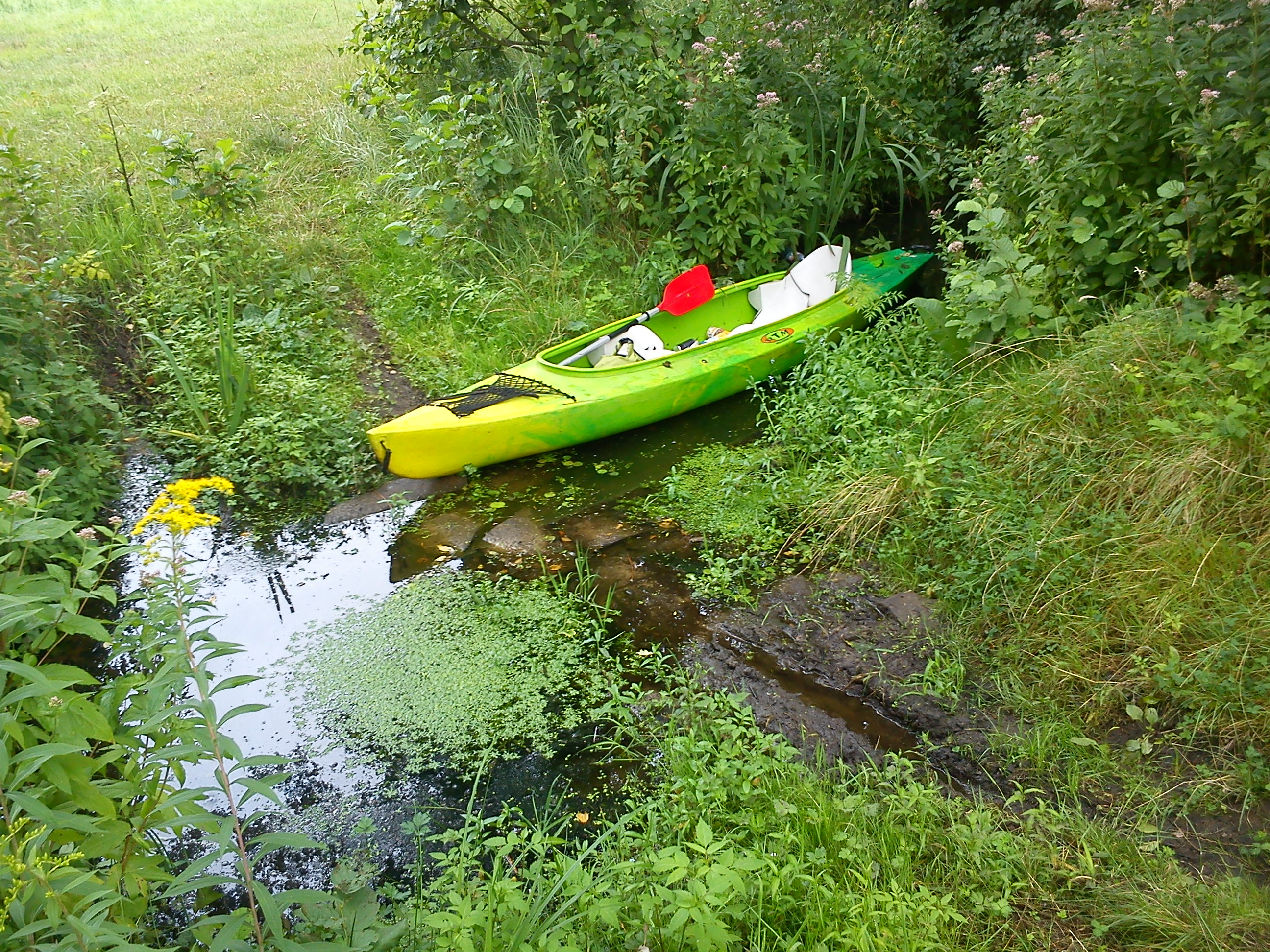 Spływ Młynówką Sułowską koło Sułowa i Rudy Milickiej. Tzw. spływ zwałkowy (dotjams).